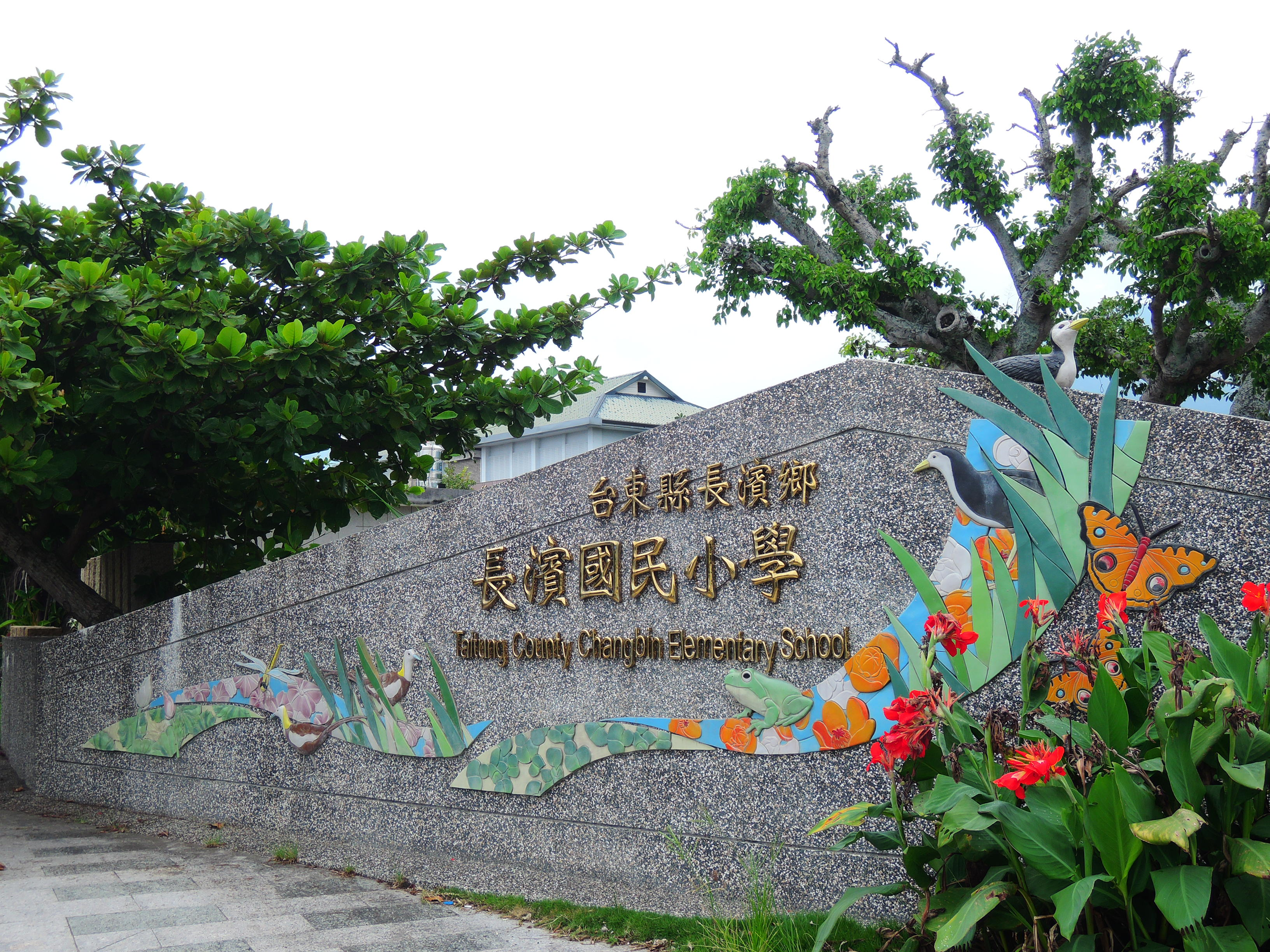 台灣台東縣立長濱國民小學